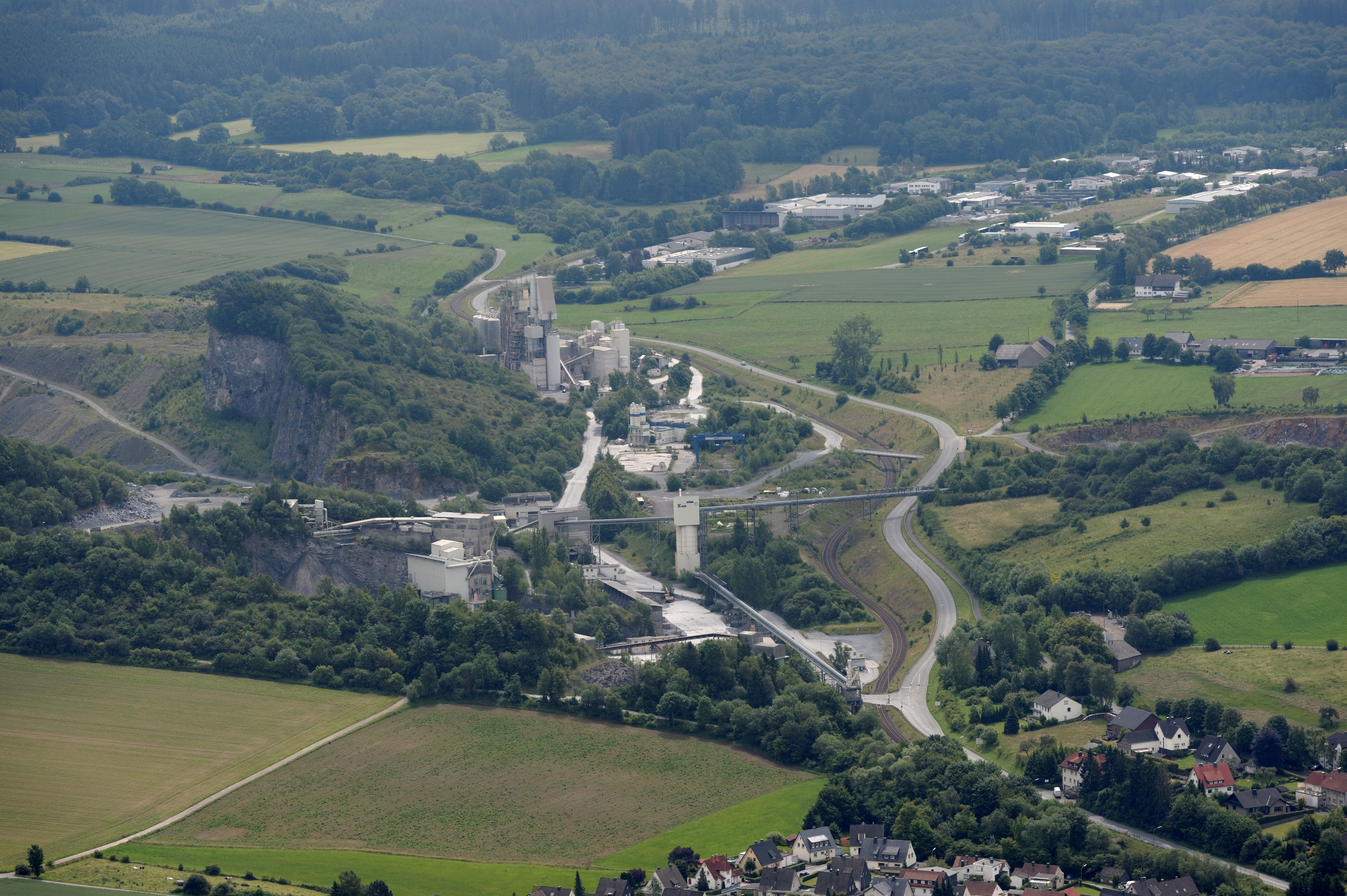 Fotoflug Sauerland-Nord. Kalksteinbrüche und Kalkwerk Köster-Risse (WESTKALK Vereinigte Warsteiner Kalksteinindustrie) südöstlich von Warstein, Naturschutzgebiet Liethöhle und Bachschwinden des Wäschebaches, Naturschutzgebiet Piusberg, Bahnstrecke Münster–Warstein, hinten Gewerbegebiet Enkerbruch, Blickrichtung Südost. The making of this document was supported by the Community-Budget of Wikimedia Germany.